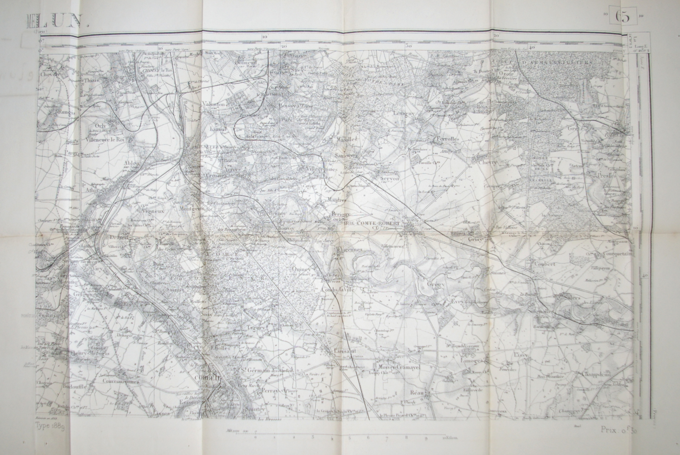 Quart de la feuille de Melun (carte d'Etat-Major)